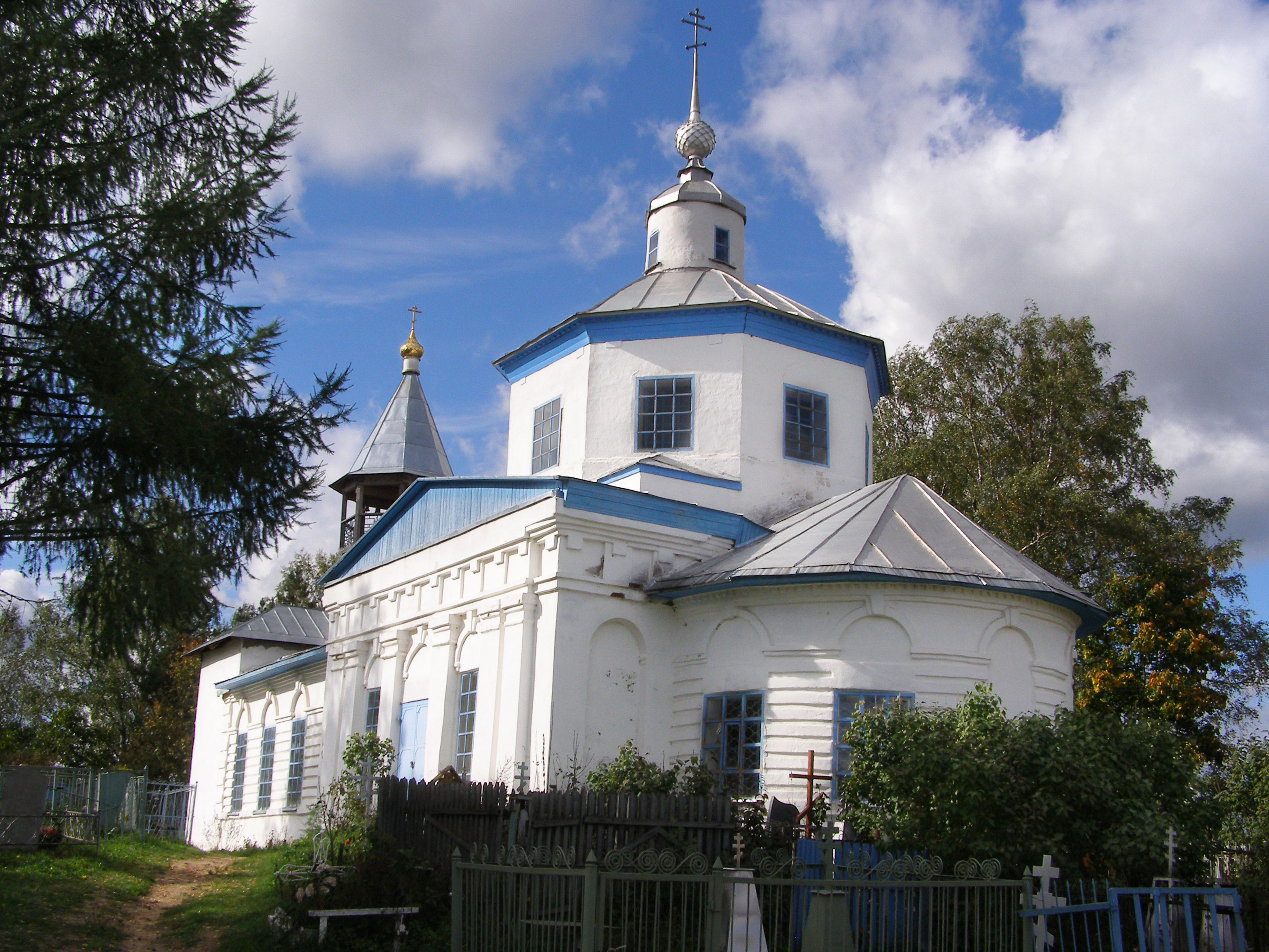 Церковь Покрова Пресвятой Богородицы